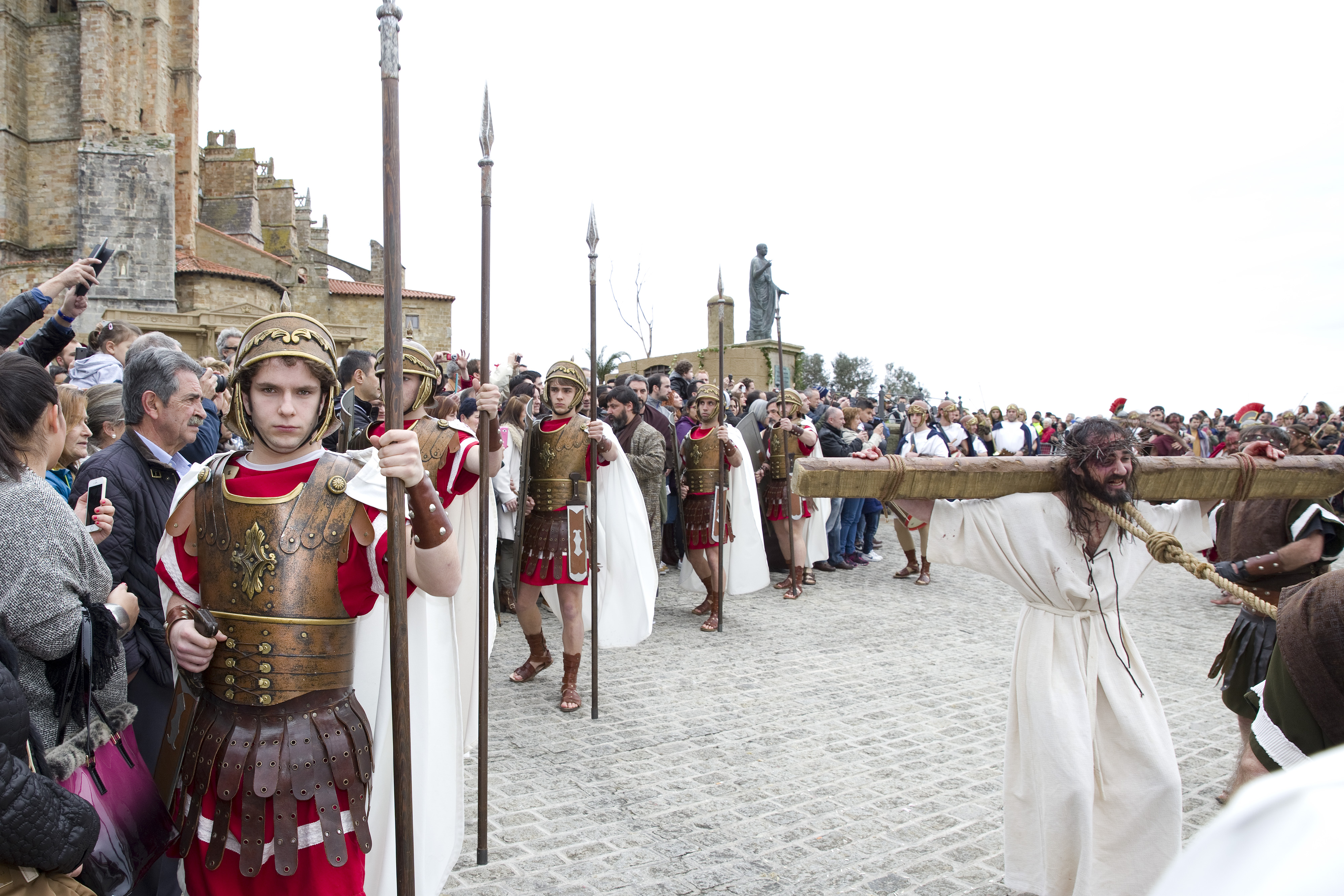 El presidente de Cantabria, Miguel Ángel Revilla, asiste a la representación de La Pasión Viviente, Fiesta declarada de Interés Turístico Nacional.